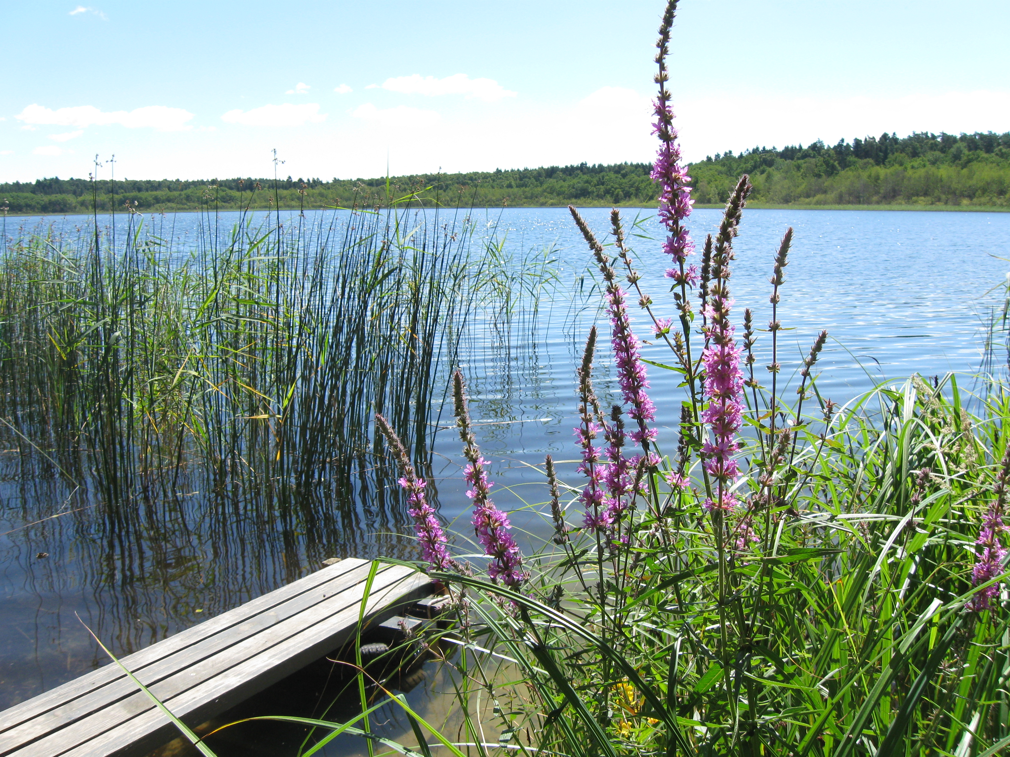 Blick vom Nordwestufer auf den Großen Pinnower See.